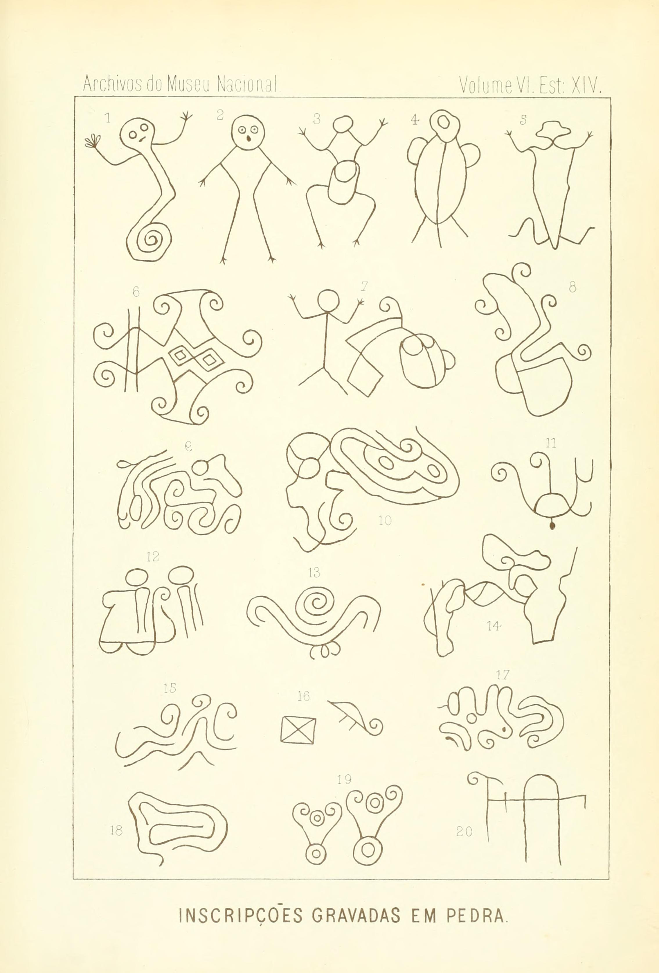 Archivos do Museu Nacional do Rio de Janeiro.